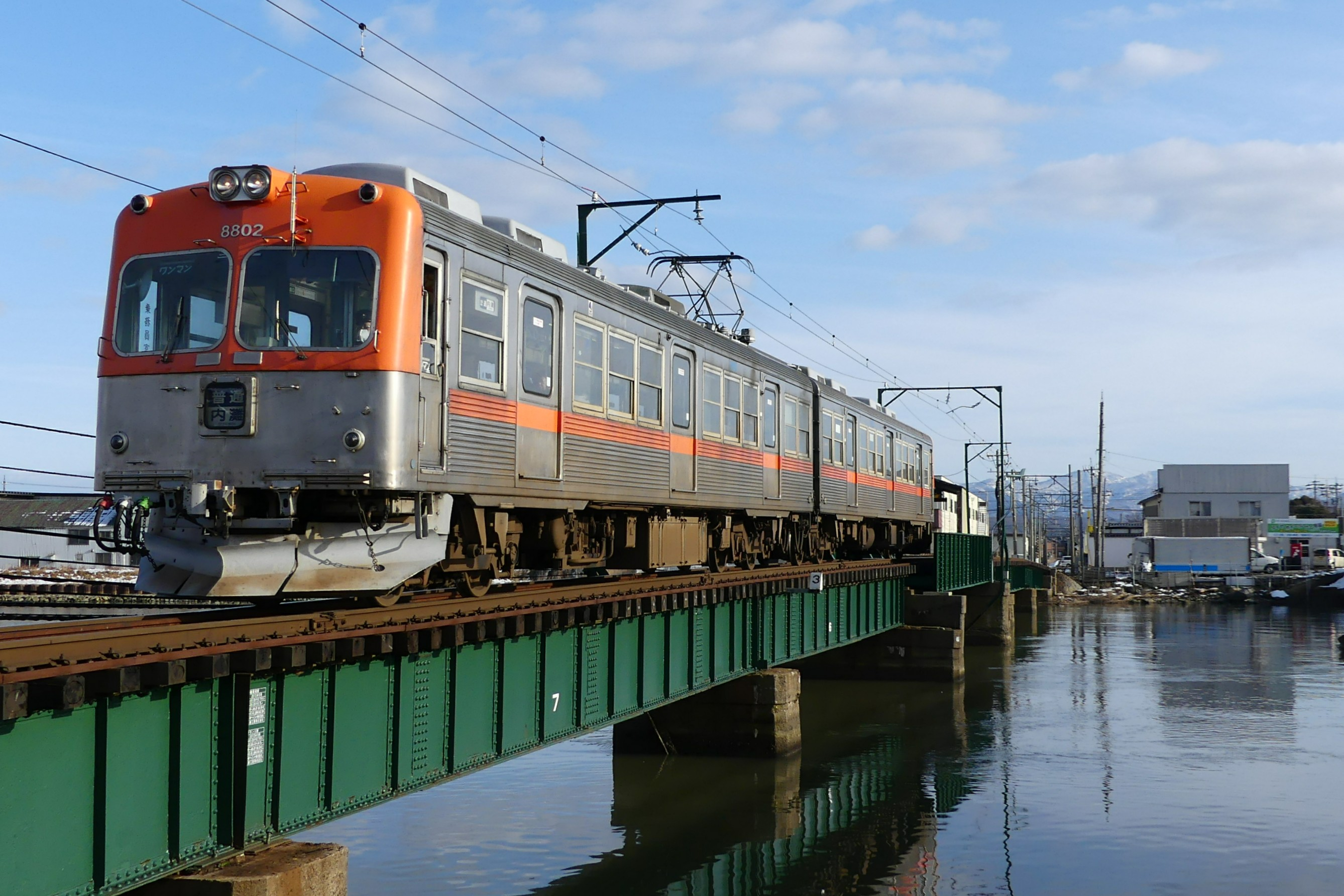 北陸鉄道浅野川線8800系電車